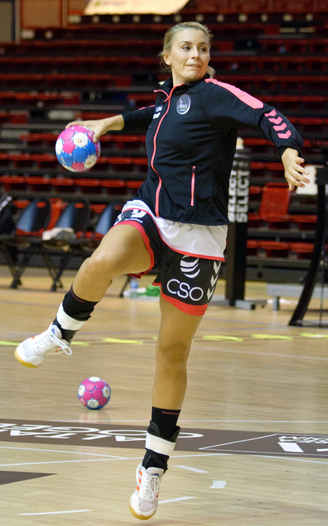 Rencontre de LFH entre Paris 92 et Brest Bretagne Handball. A la Halle Carpentier (Paris), le 05 septembre 2018.